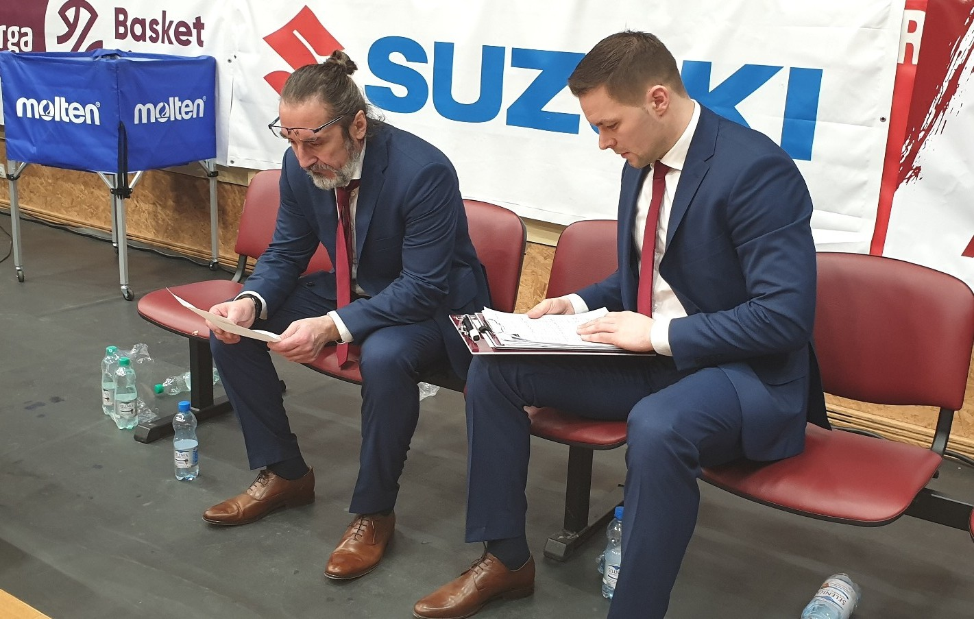 Trenerzy Jacek Winnicki, Maciej Raczyński